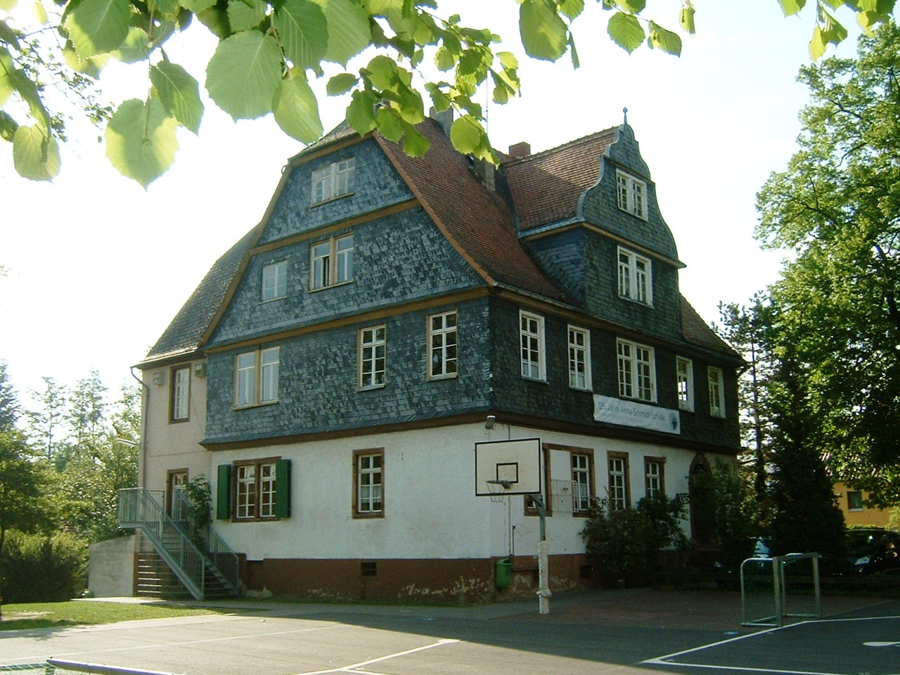 Anna-Schmidt-Schule Verwaltung (Frankfurt Nieder_Erlenbach)